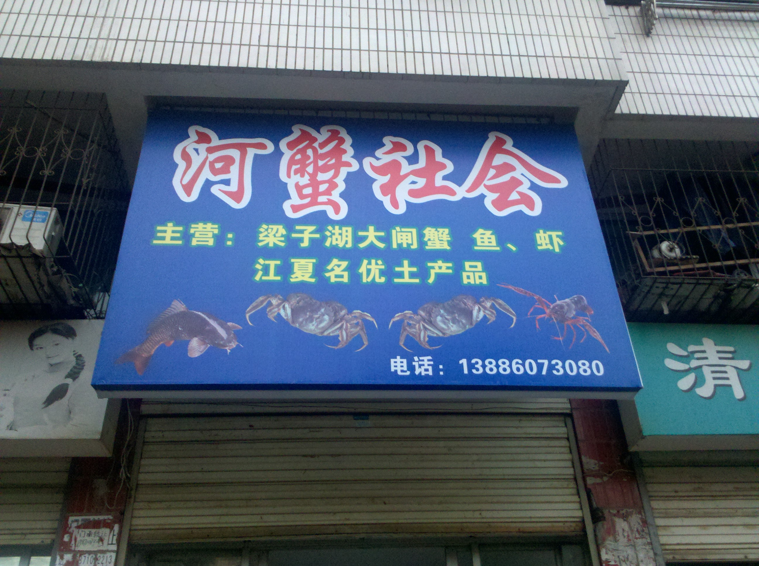 中華人民共和國湖北省武漢市江夏區一間河蟹爲特色的餐館